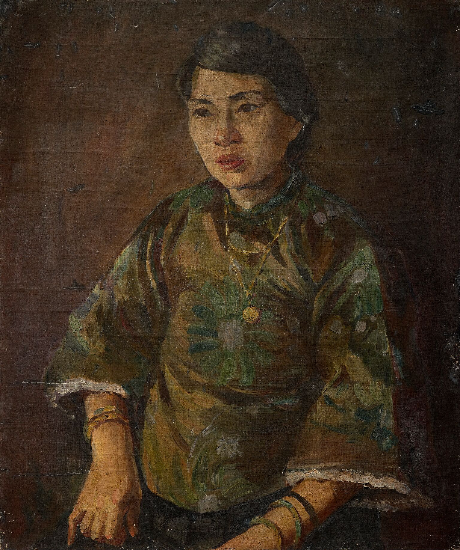 中文（台灣）: ,1935,油畫